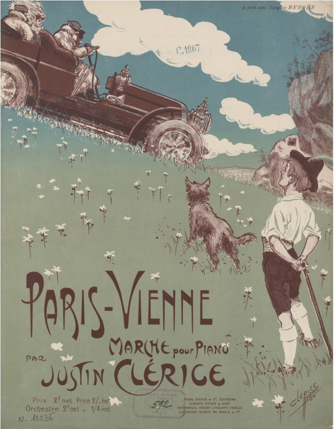 Paris-Vienne : marche pour piano par Justin Clérice [dedicated to Jacques Berghs], sheet music cover designed by Justin Clérice, published by Enoch & Cie (Paris).